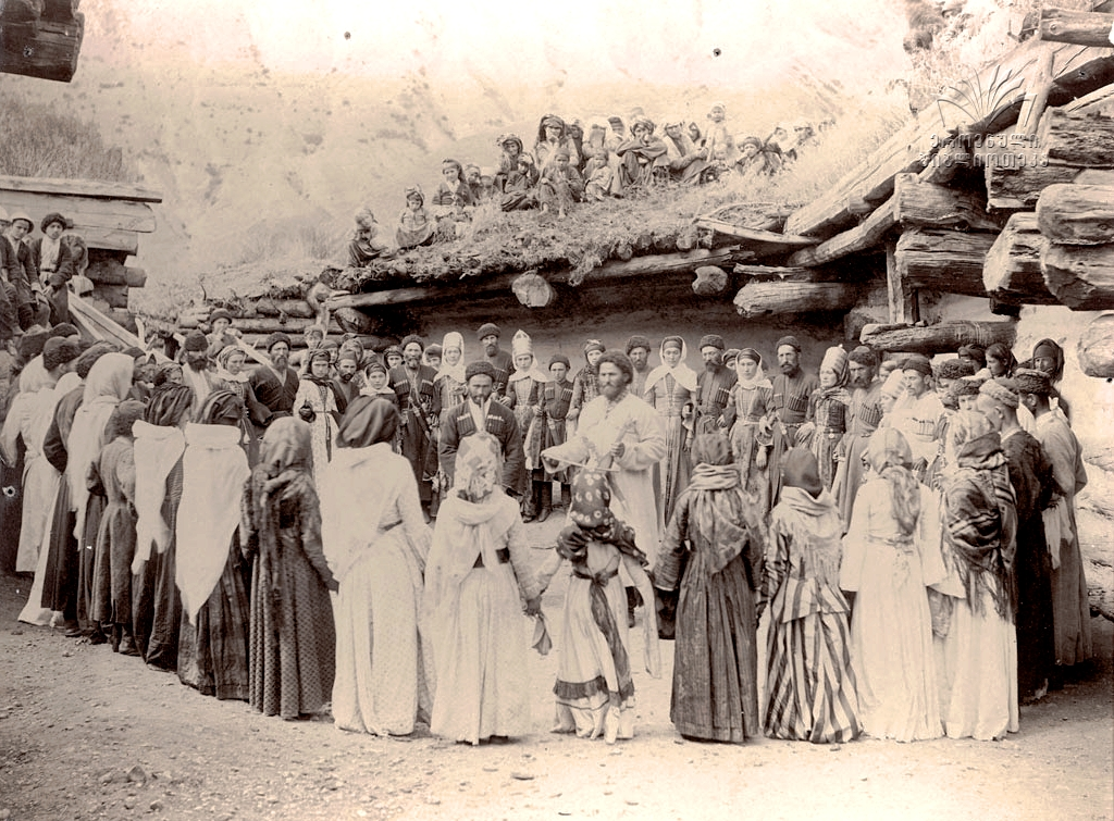 ყარაჩაელები.